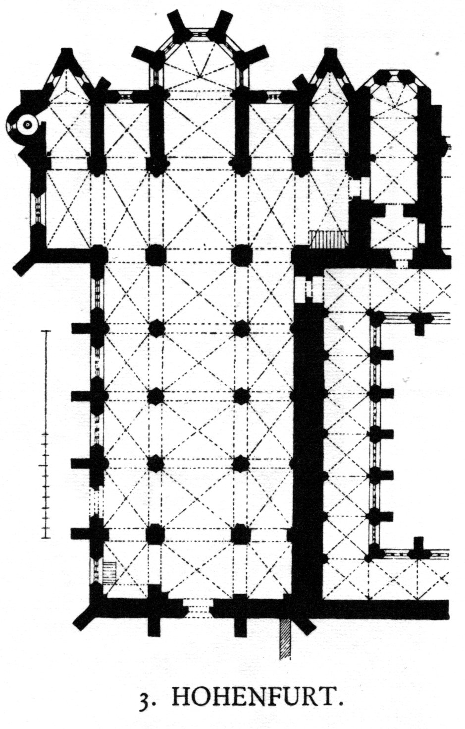 Vyšší Brod (deutsch Hohenfurth), Zisterzienserkirche Maria-Himmelfahrt